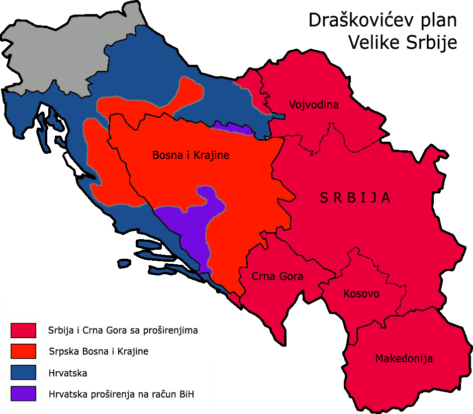 Srpskohrvatski / српскохрватски: Plan Velike Srbije koji je predložio Vuk Drašković početkom 1990-ih.